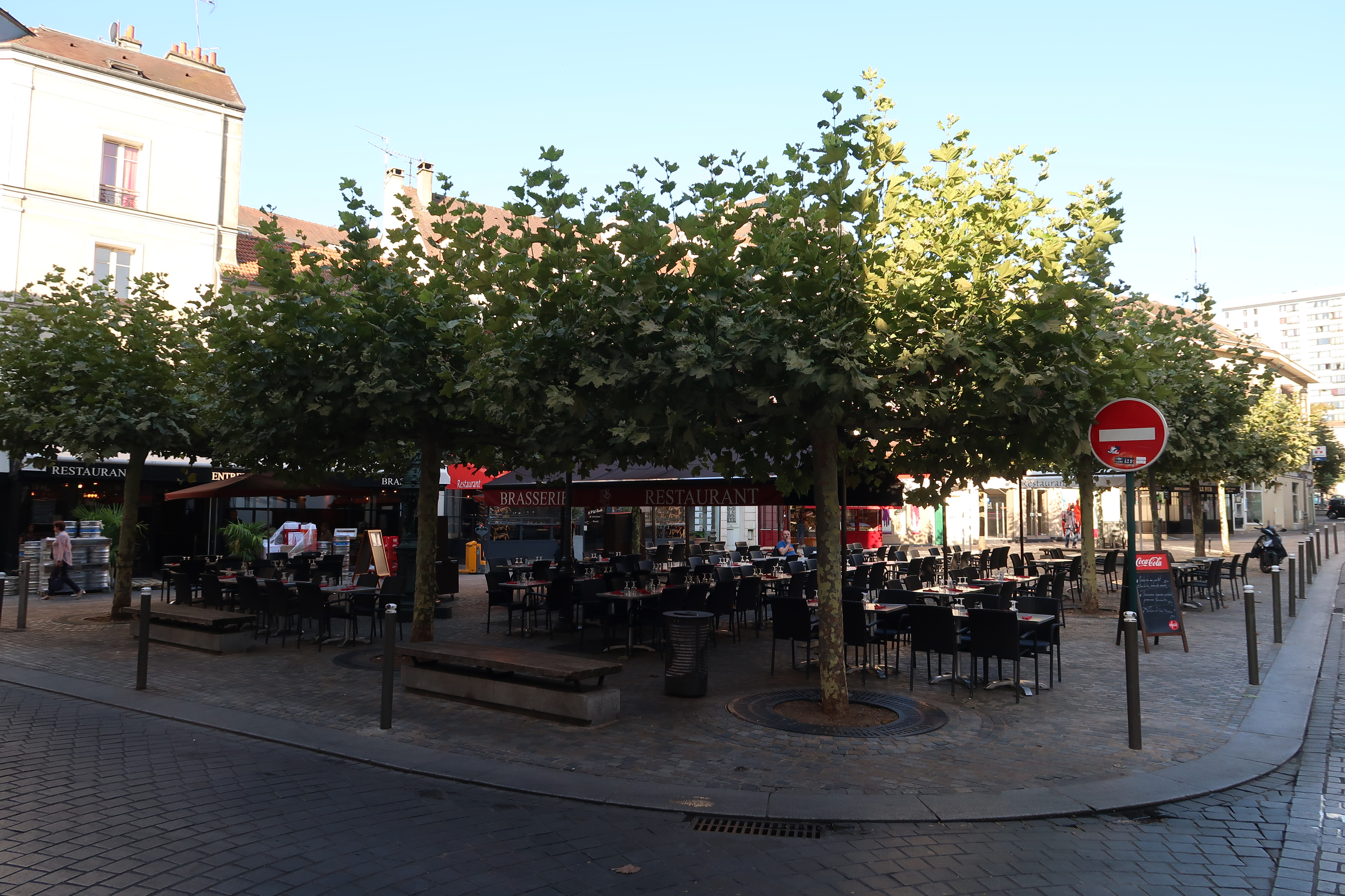 Place du Général-Leclerc à Suresnes (Hauts-de-Seine).